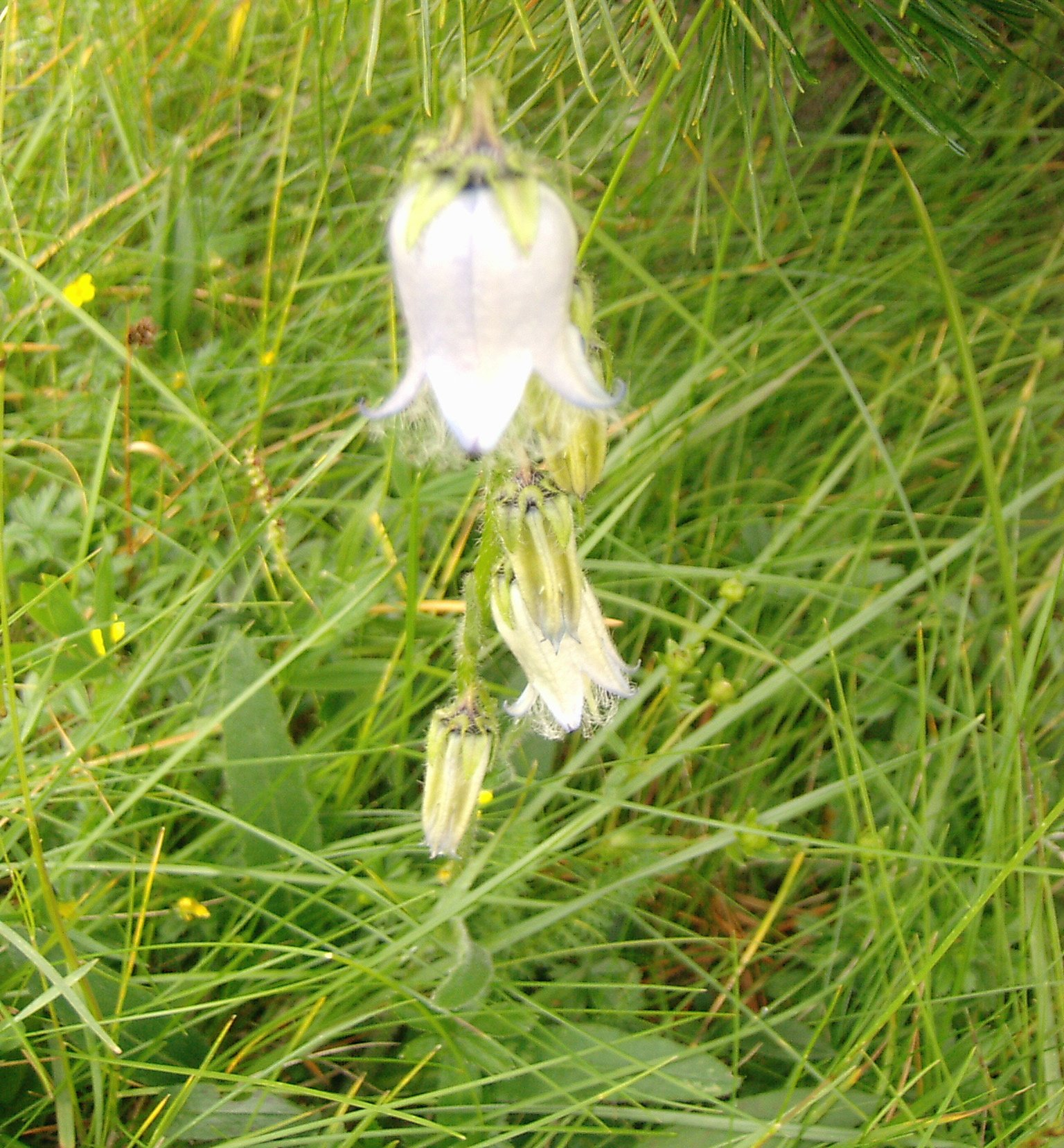 Weiße Bärtige Glockenblume. Fundort: Puflatsch, Seiser Alm, Südtirol, Italien